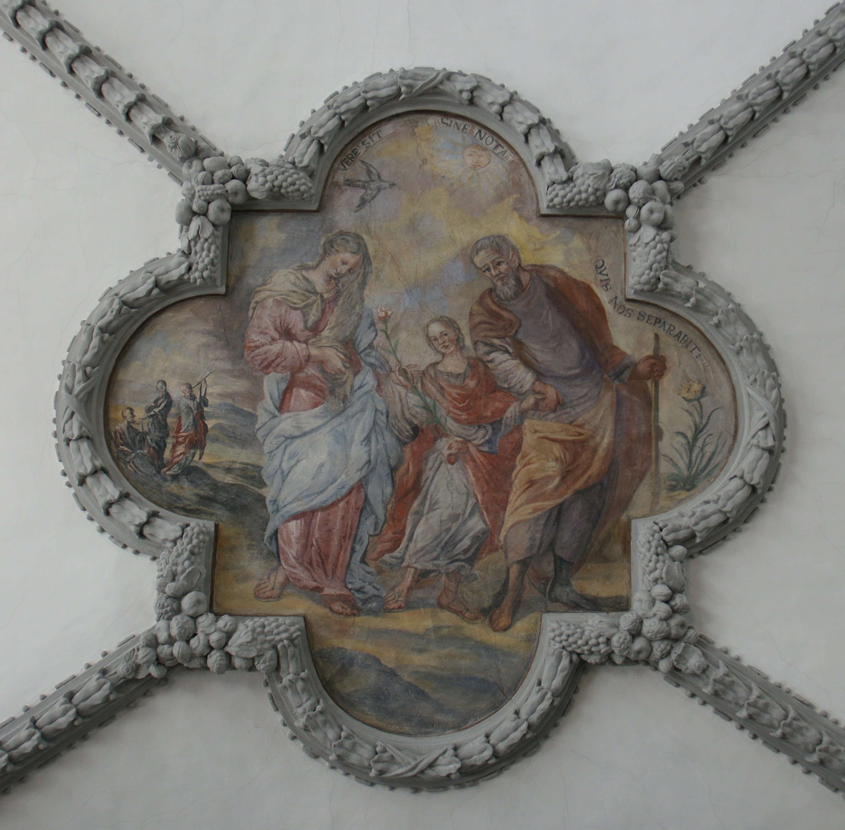 Pfarrkirche "Unsere Liebe Frau Unbefleckte Empfängnis" in Schlins, Vorarlberg.